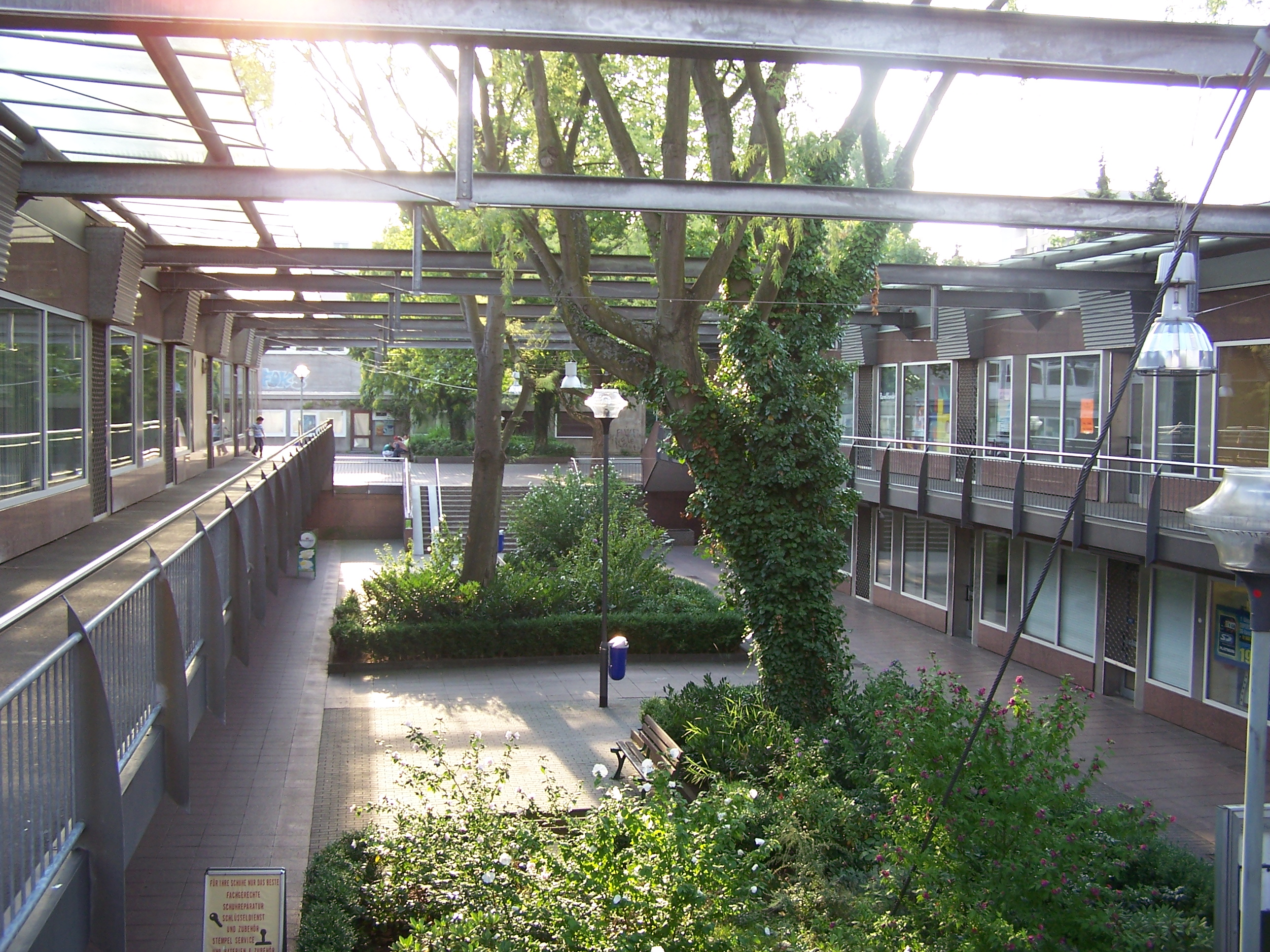 Das kleine Zentrum in der Thomas-Mann-Straße, Nordweststadt Frankfurt